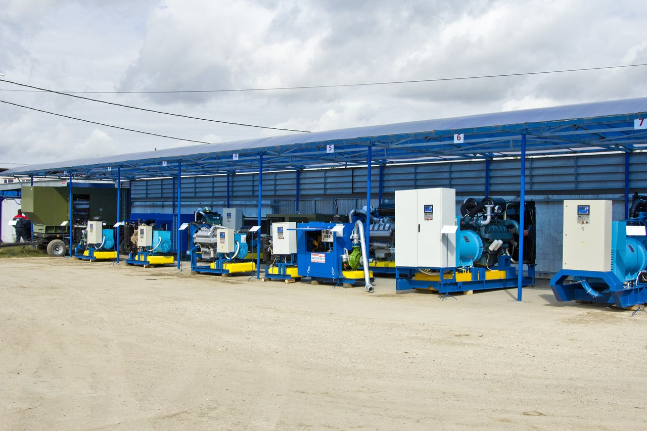 Готовая продукция ПСМ на конференции поставщиков в Красном Бору осенью 2012 года.